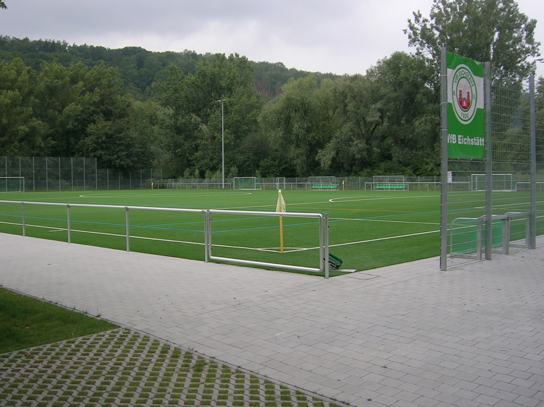 Schottenau Eichstätt: Kunstrasenplatz des VfB Eichstätt, Baujahr 2017 (offizielle Eröffnung: 20. Oktober 2017)